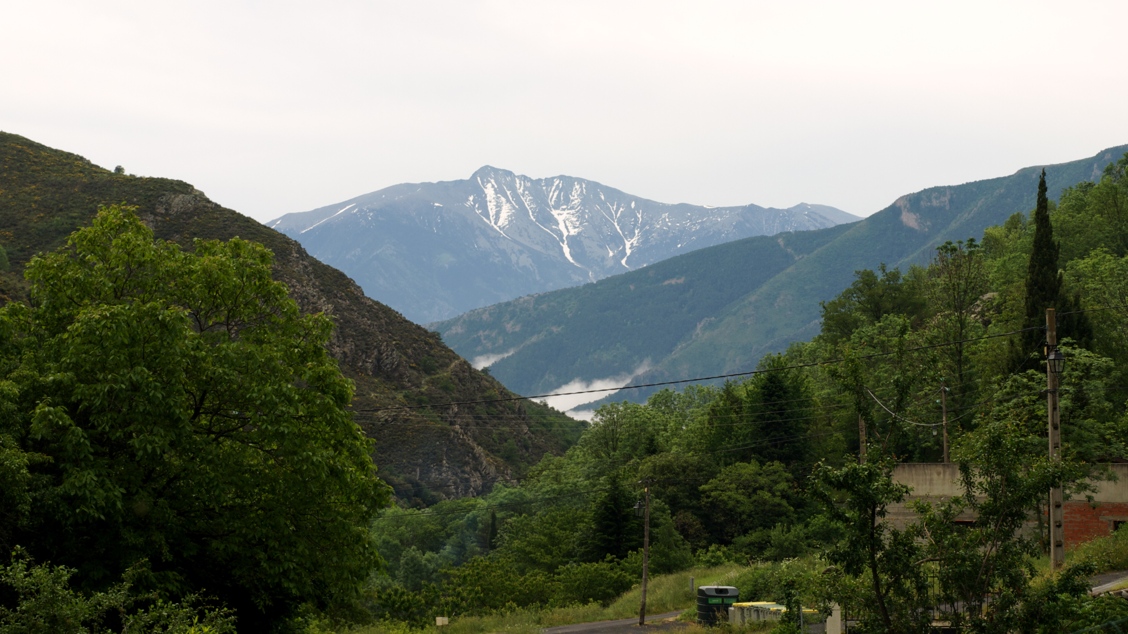 El Canigó vist des d'Orbanyà, al Conflent